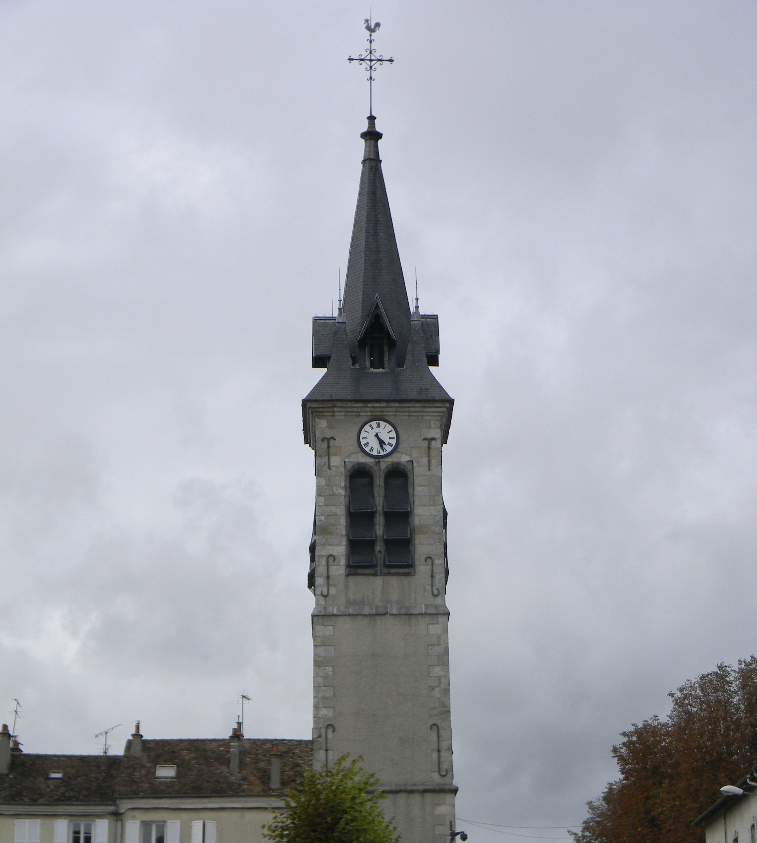 Tour de l'ancienne Église Saint-Barthélémy de Melun (77000)